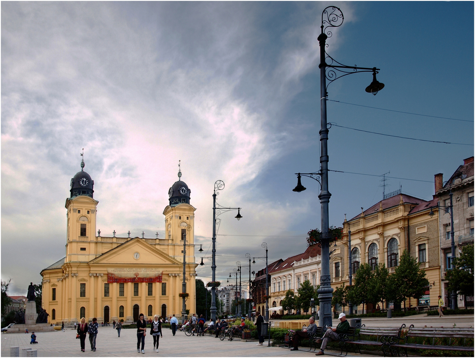 Ref. Nagytemplom (Debrecen, Kálvin tér) This is a photo of a monument in Hungary. Identifier: 5233